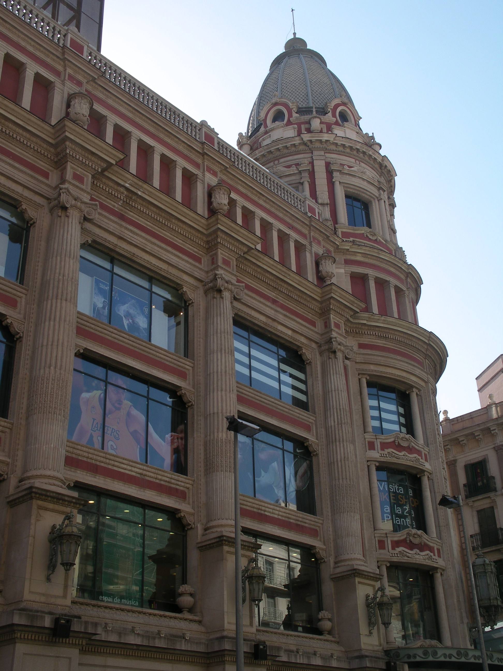 Edifici de Can Jorba (El Corte Inglés), al Portal de l'Àngel de Barcelona